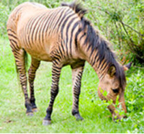 Zorse